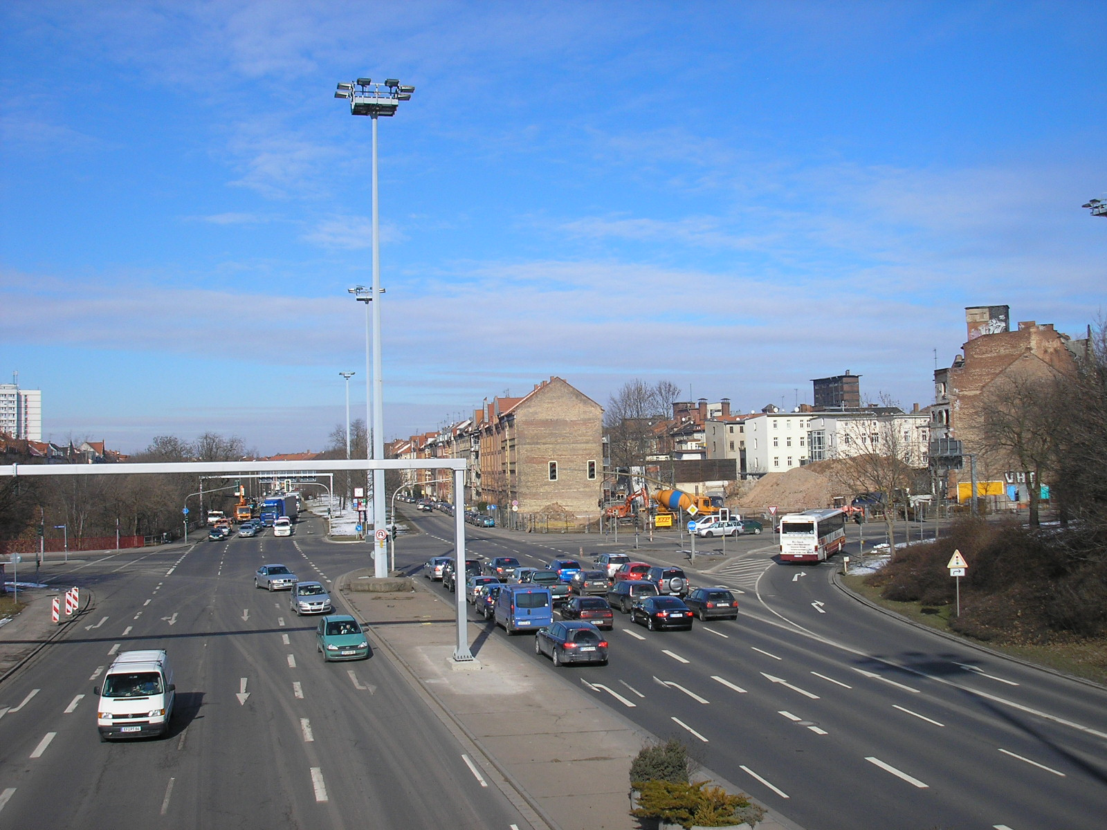 Das nördliche Kreuz des Schmidtstedter Knotens in Erfurt (Thüringen).